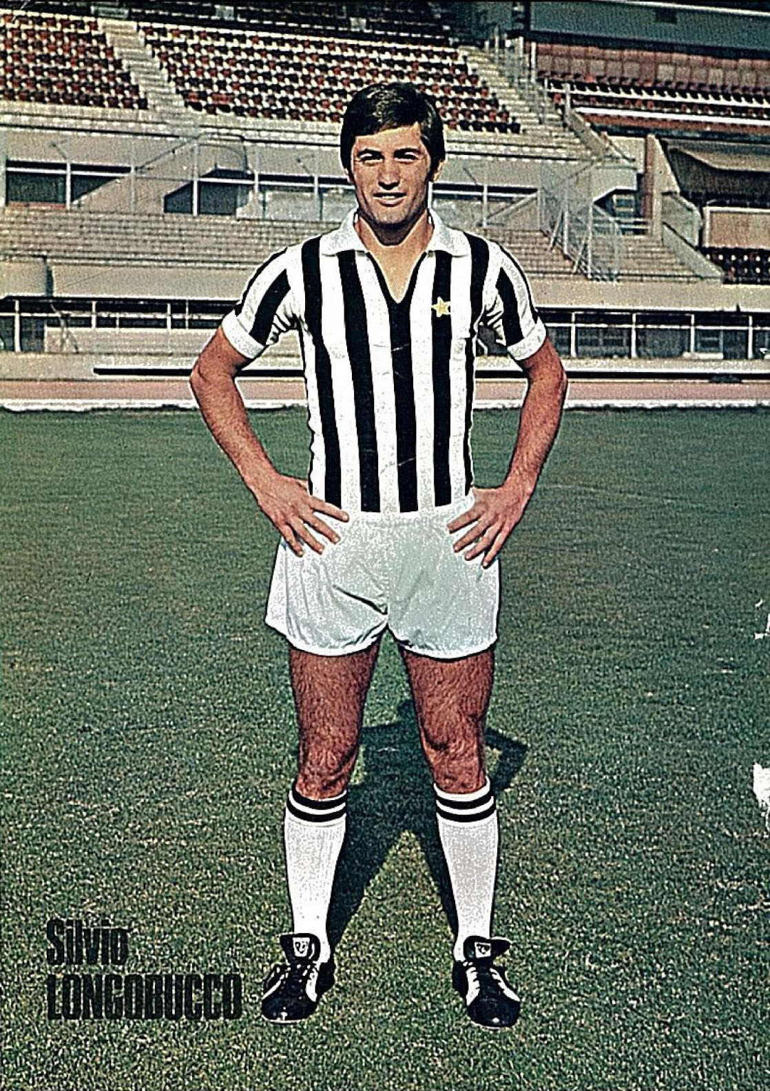 Il calciatore italiano Silvio Longobucco alla Juventus all'inizio della stagione 1971-72, in posa all'interno dello stadio Comunale di Torino.